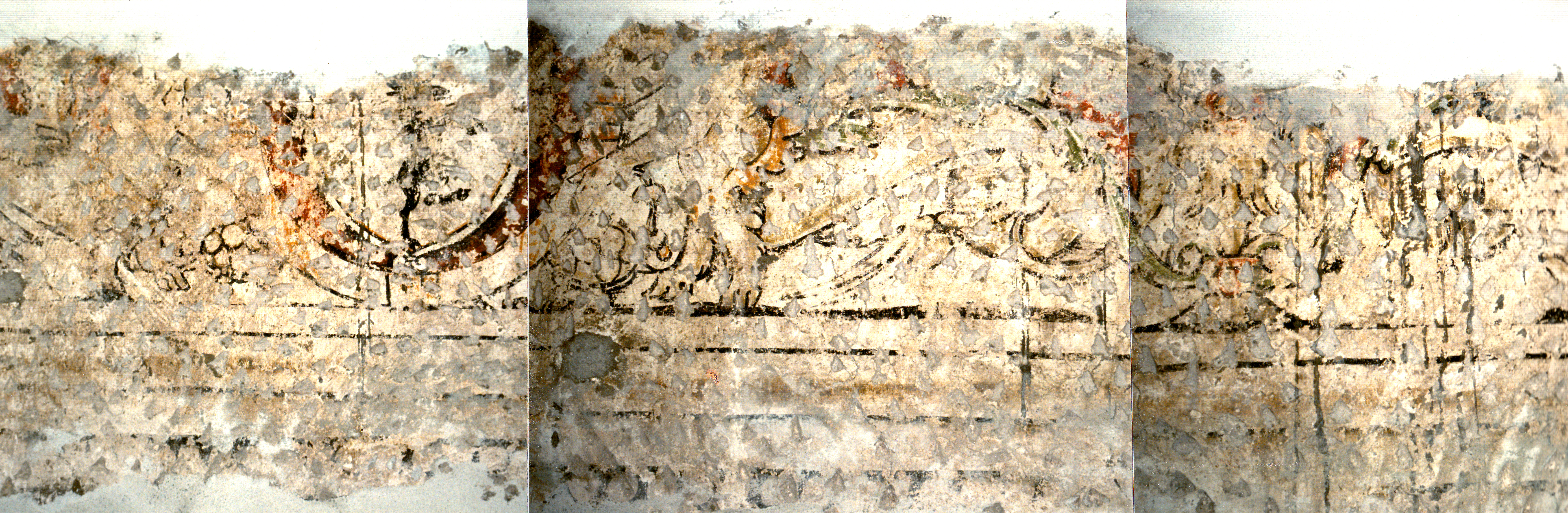 Affresco quattrocentesco dello stemma della famiglia Capra sorretto da figure alate - Esistente in un edificio della Famiglia Capra a Carrè Vicenza - danneggiato da interventi del 1988.